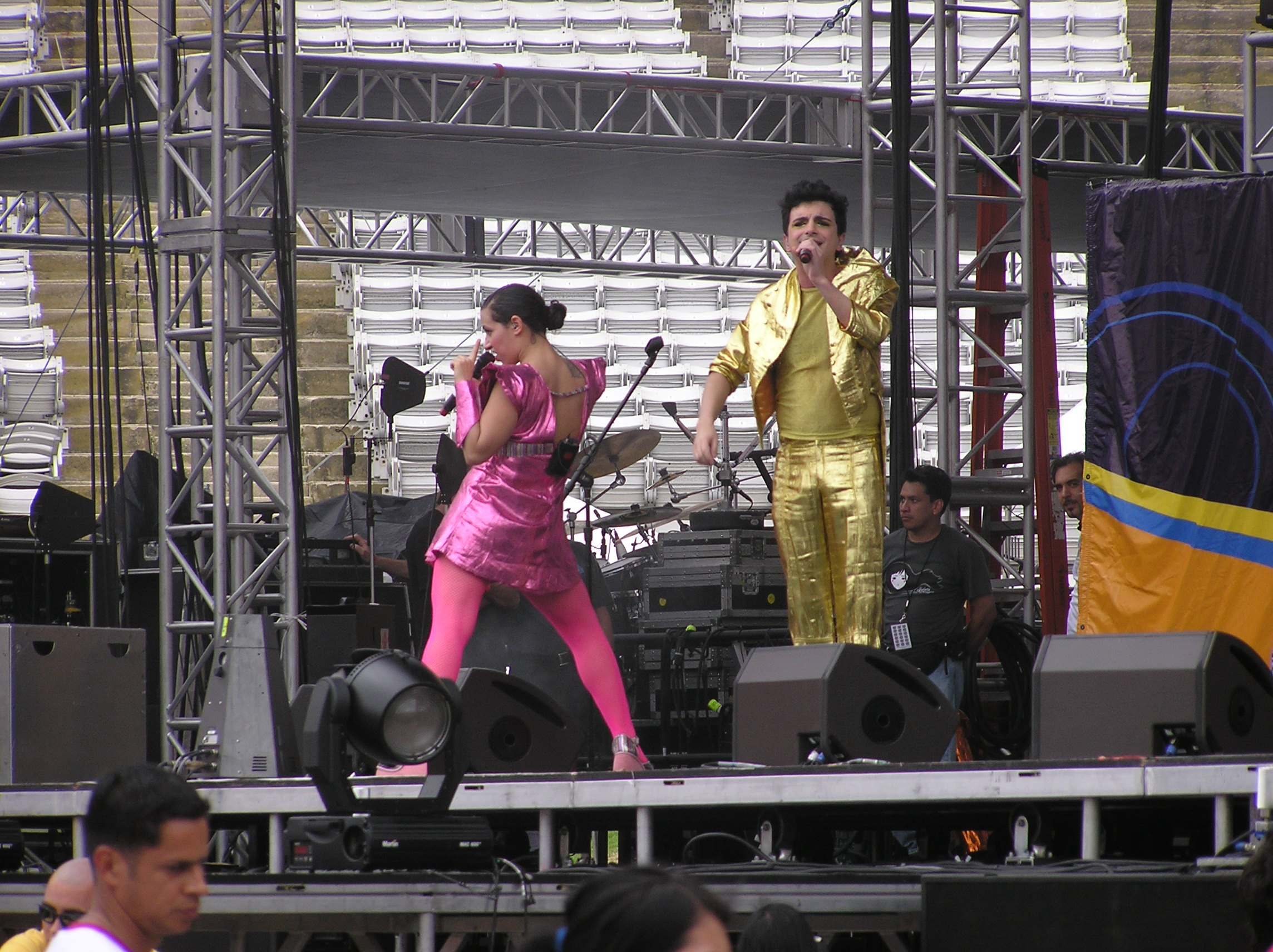 Cantante Ale Sergi y Juliana Gattas de Miranda! en Reventon Superestrella 2006, LA Coliseum. Tomada por el usuario Cool Pixels de Flickr y utilizada bajo los permisos correspondientes de Creative Commons.